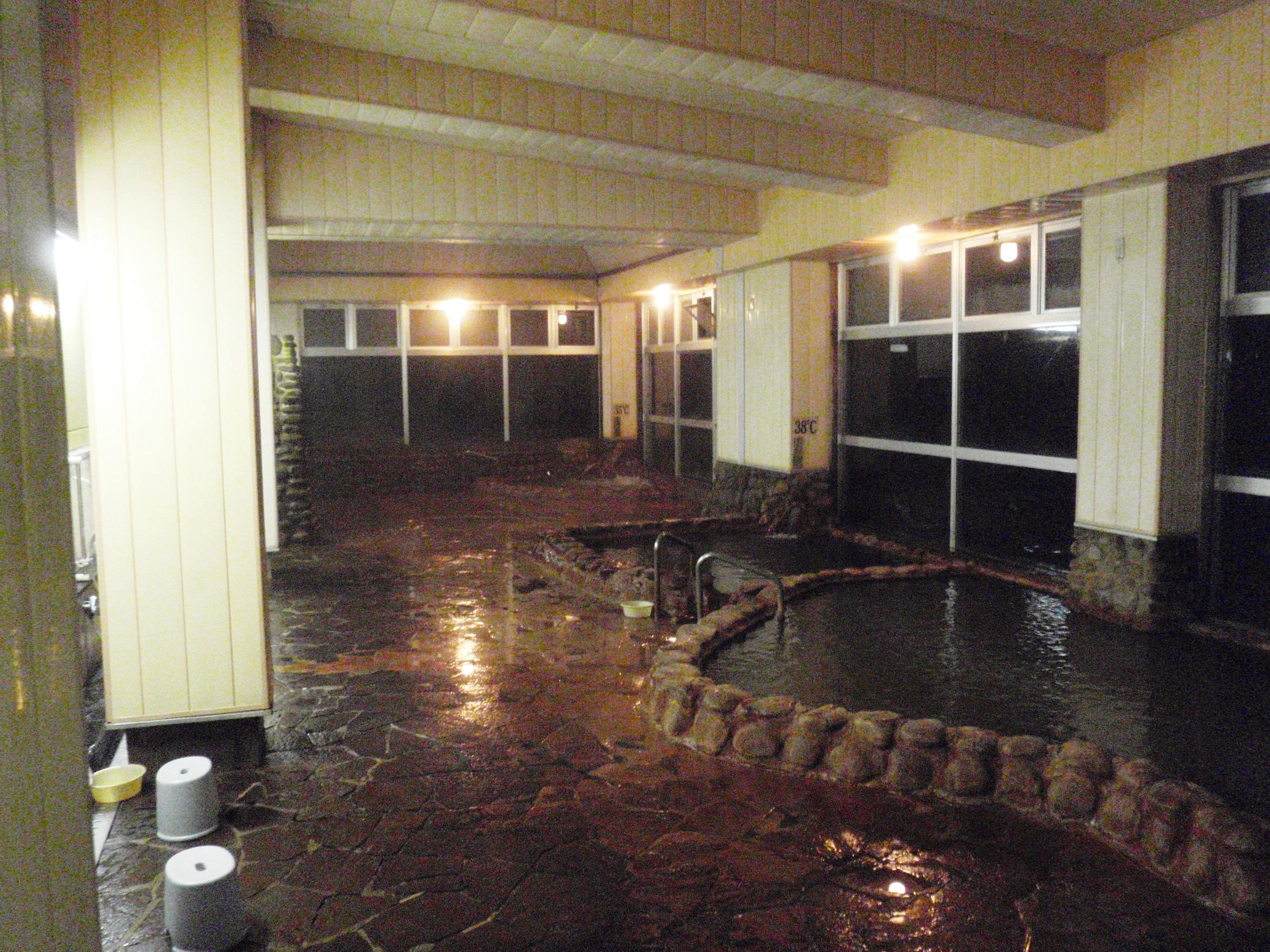 湯ノ岱温泉、国民温泉保養センター内風呂